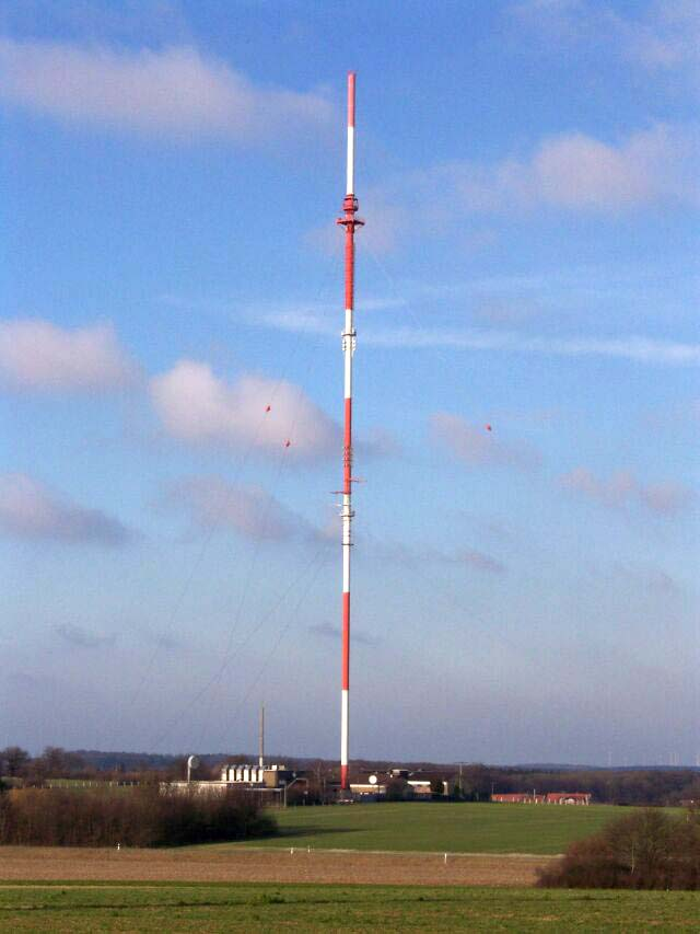 Funkturm des WDR bei Nottuln